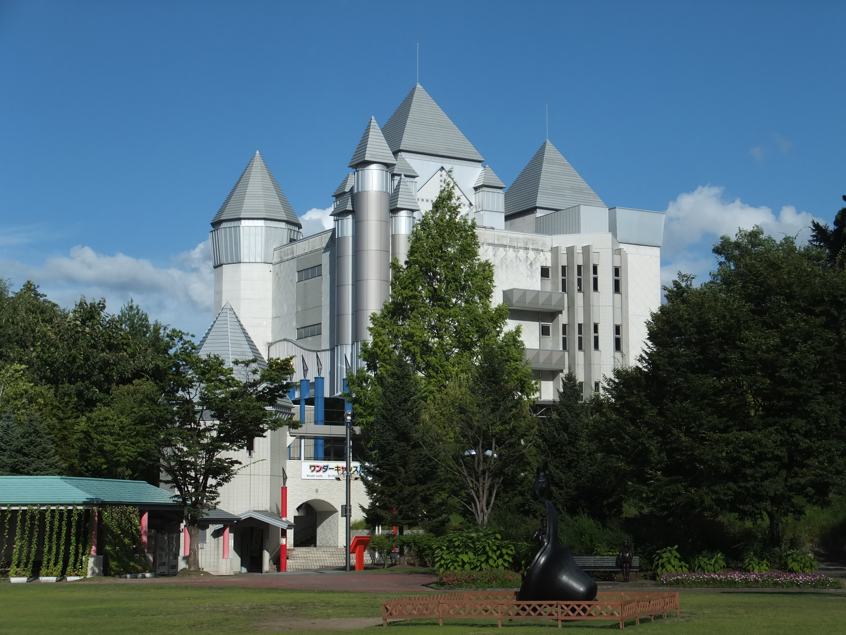 秋田ふるさと村、ワンダーキャッスル。かつてはスノーホワイト城と呼ばれた。トリックアートや大型アスレチックが設置されている。